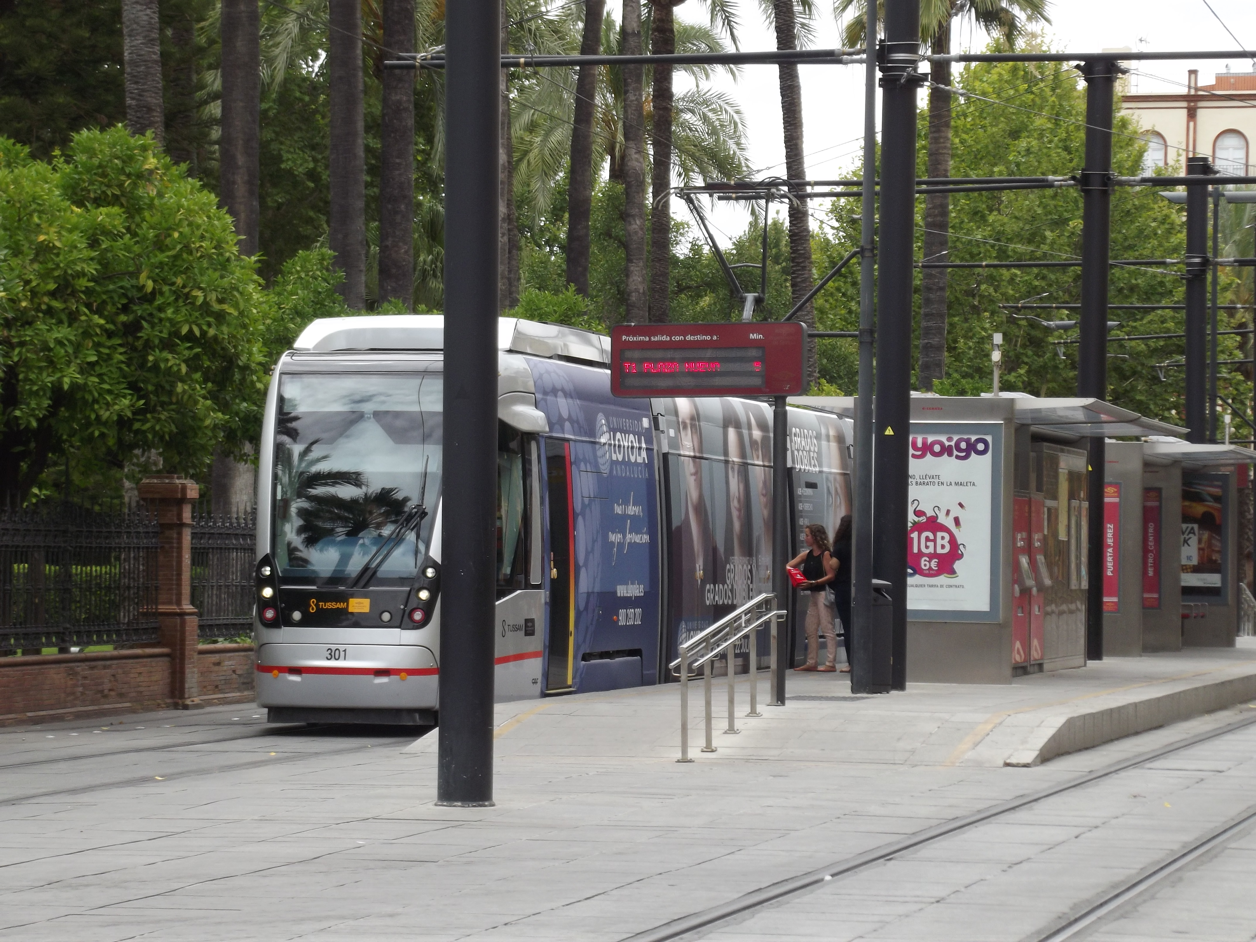 Metrocentro estacionado en Puerta Jerez